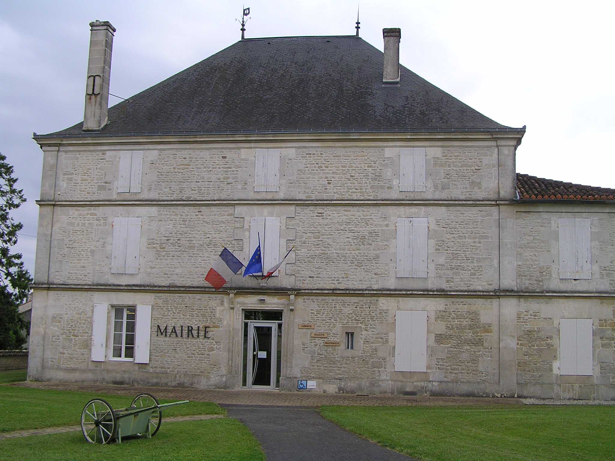 mairie de Hiersac